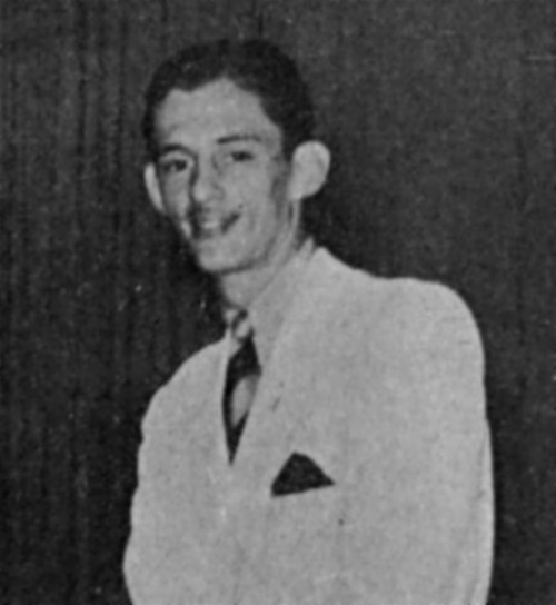 O radialista cearense César de Alencar em 1942.